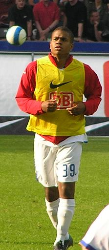 Chinedu Ede na rozgrzewce przed meczem Hertha - Werder. Maj 2007